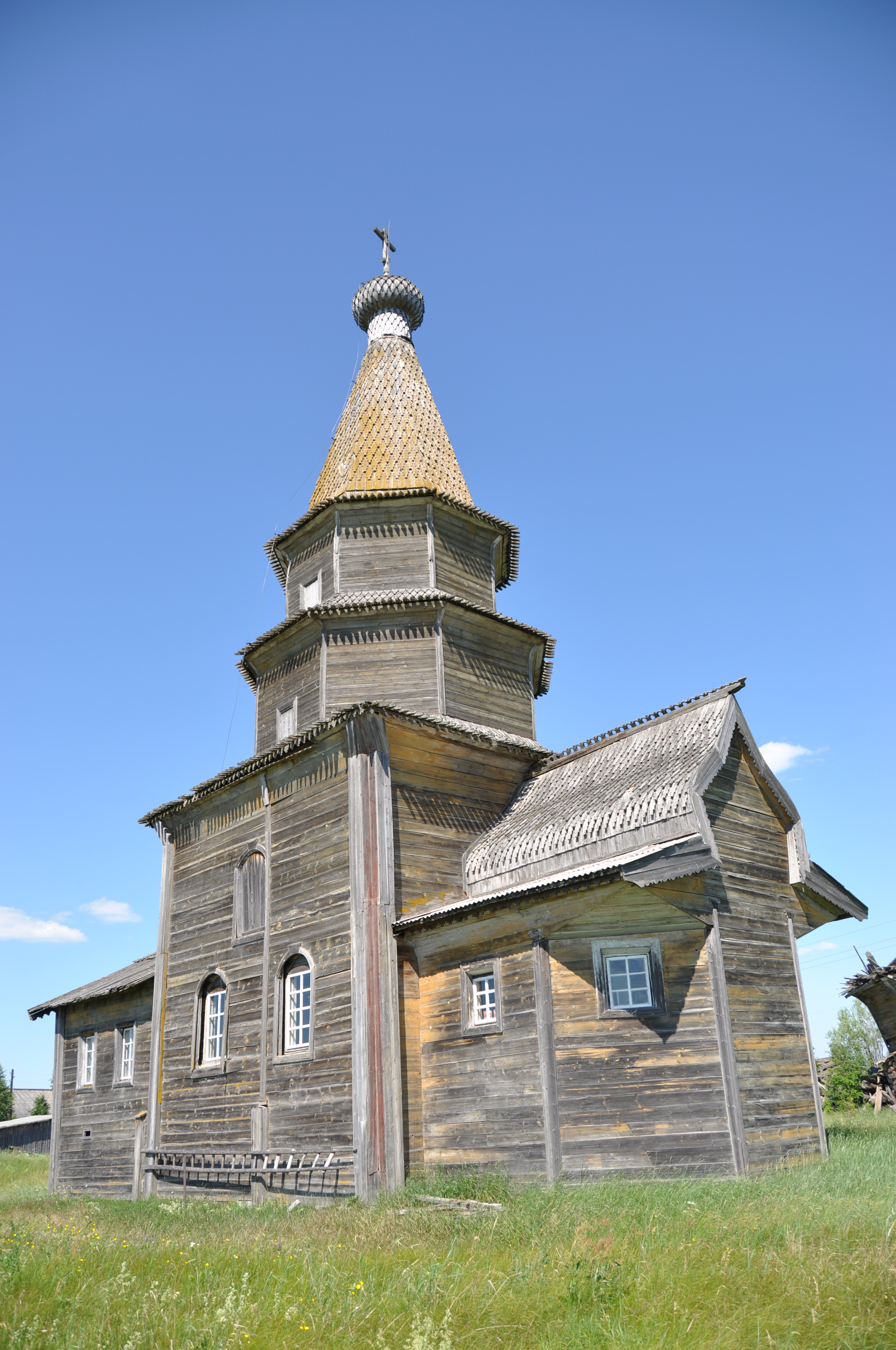 Петропавловская церковь в селе Ратонаволок (Архангельская обл).